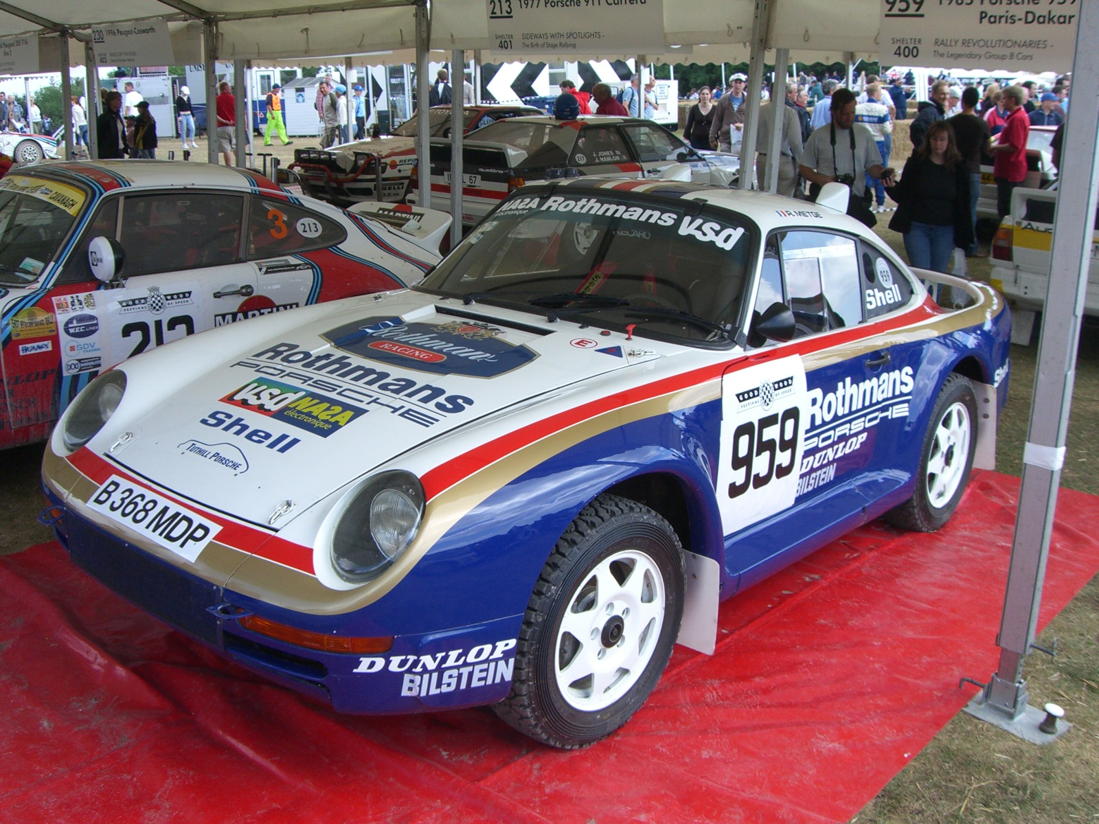 Porsche 959 Ralley version1985 Porsche 959 Paris-Dakar